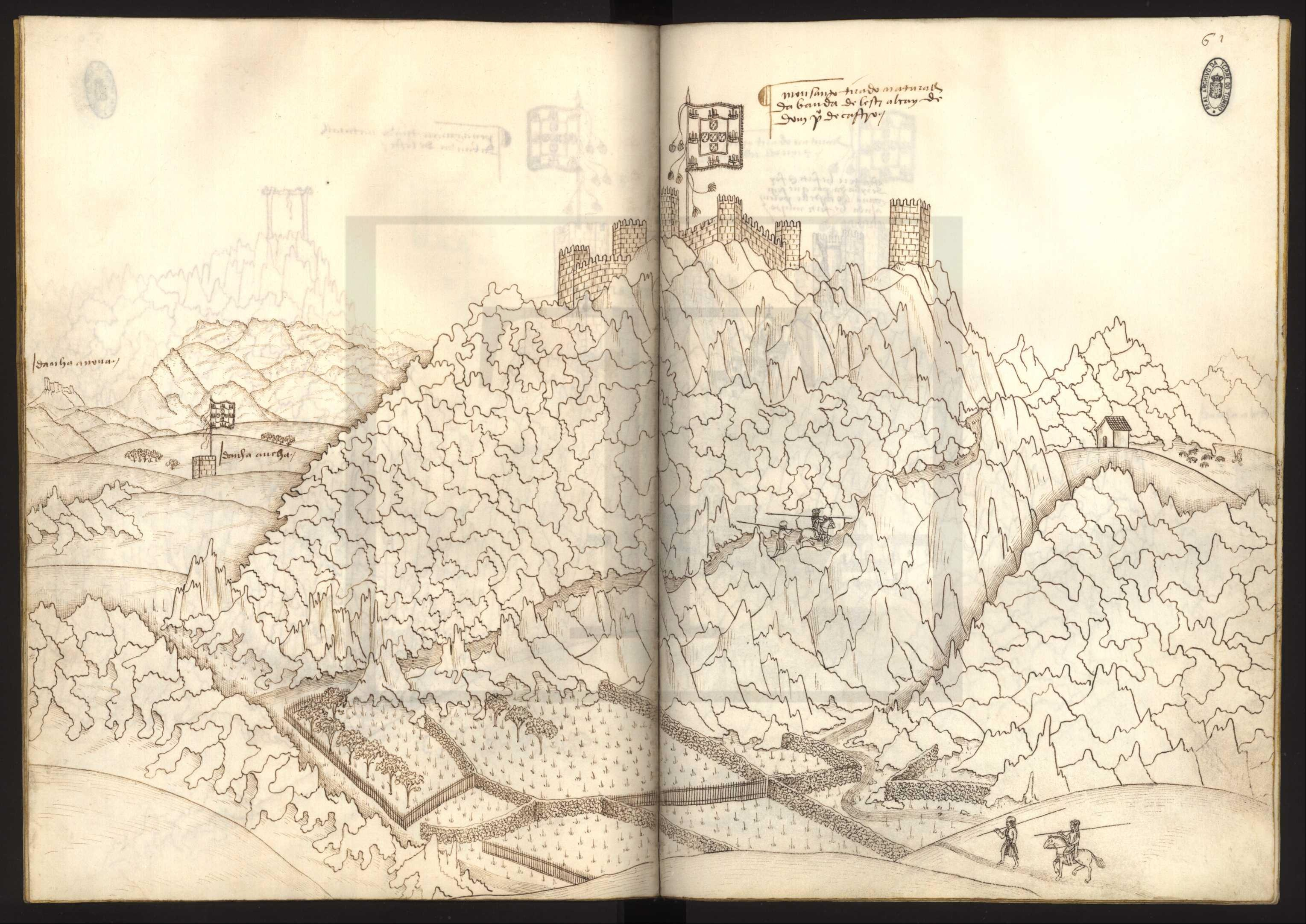 Livro das Fortalezas 61 - Monsanto